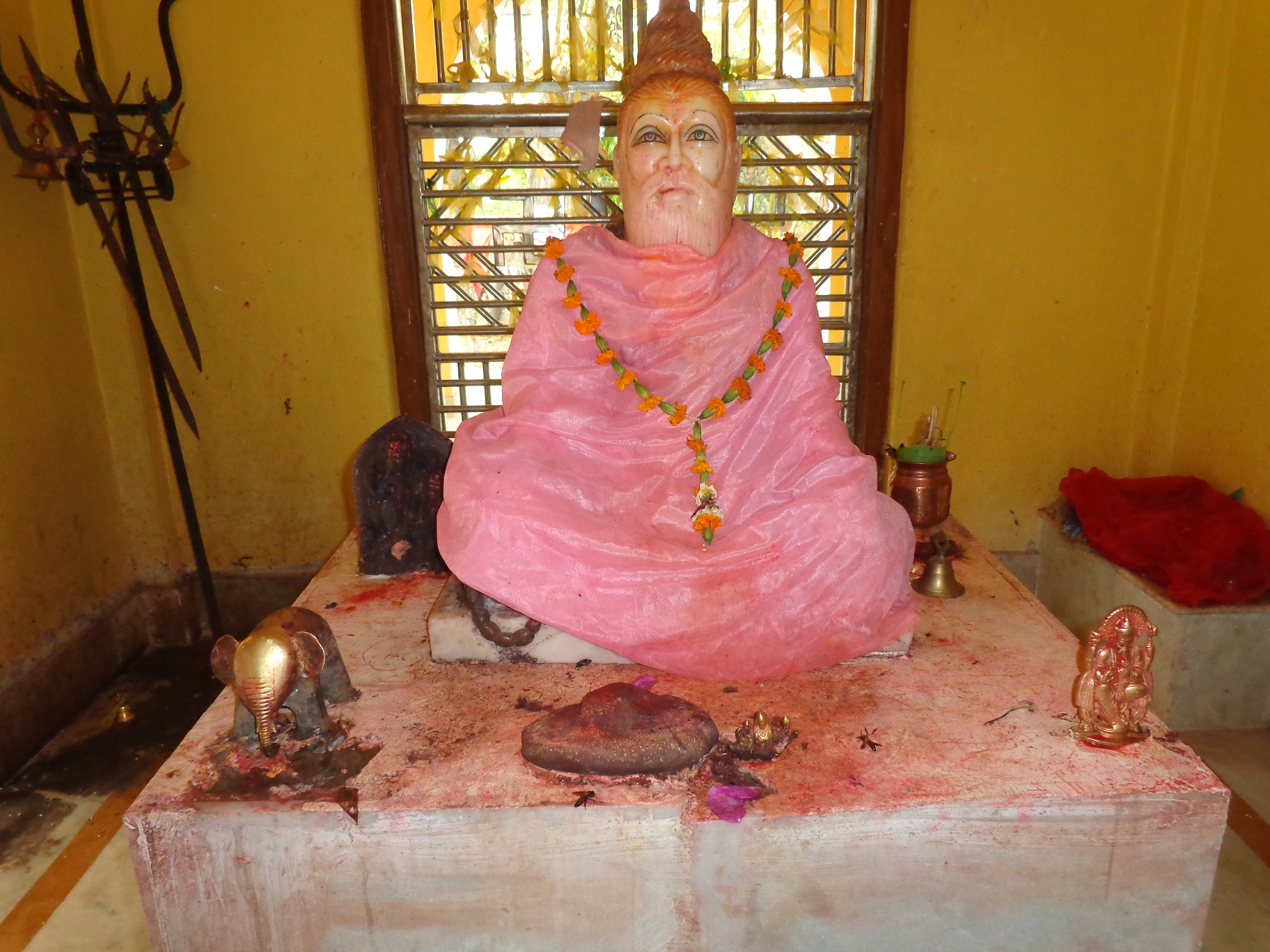 नेपाल भाषा: Siddhanath dewata Kanchanpur